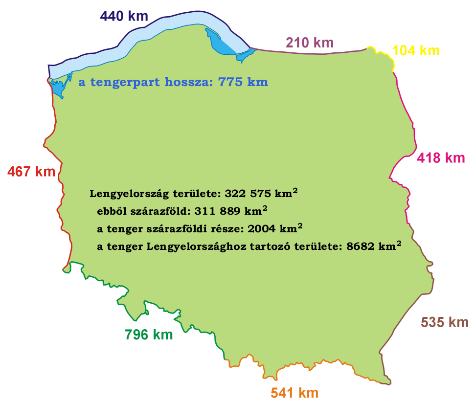 Lengyel határok